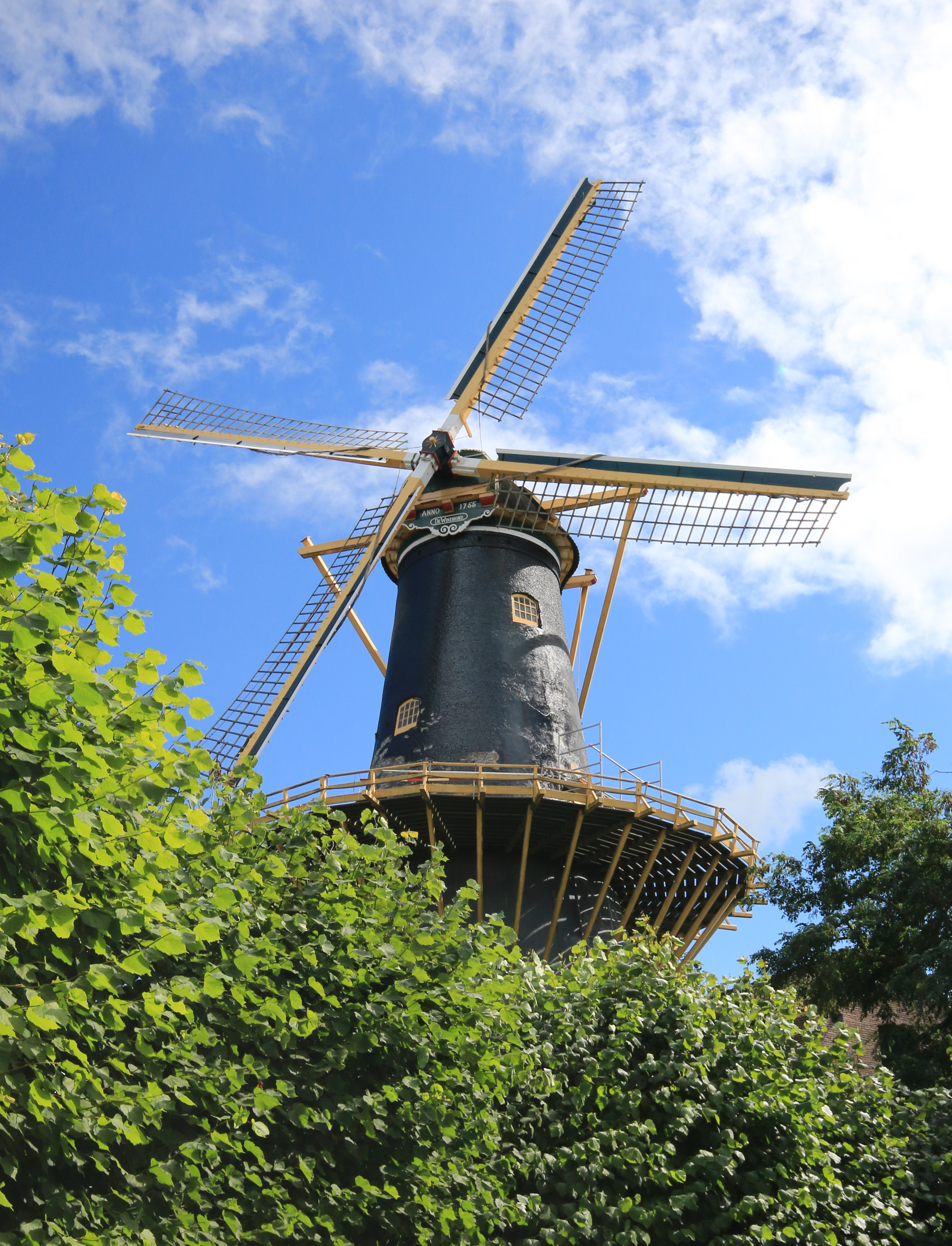 De Windhond, een graanmolen in Woerden die nog wekelijks in gebruik is.